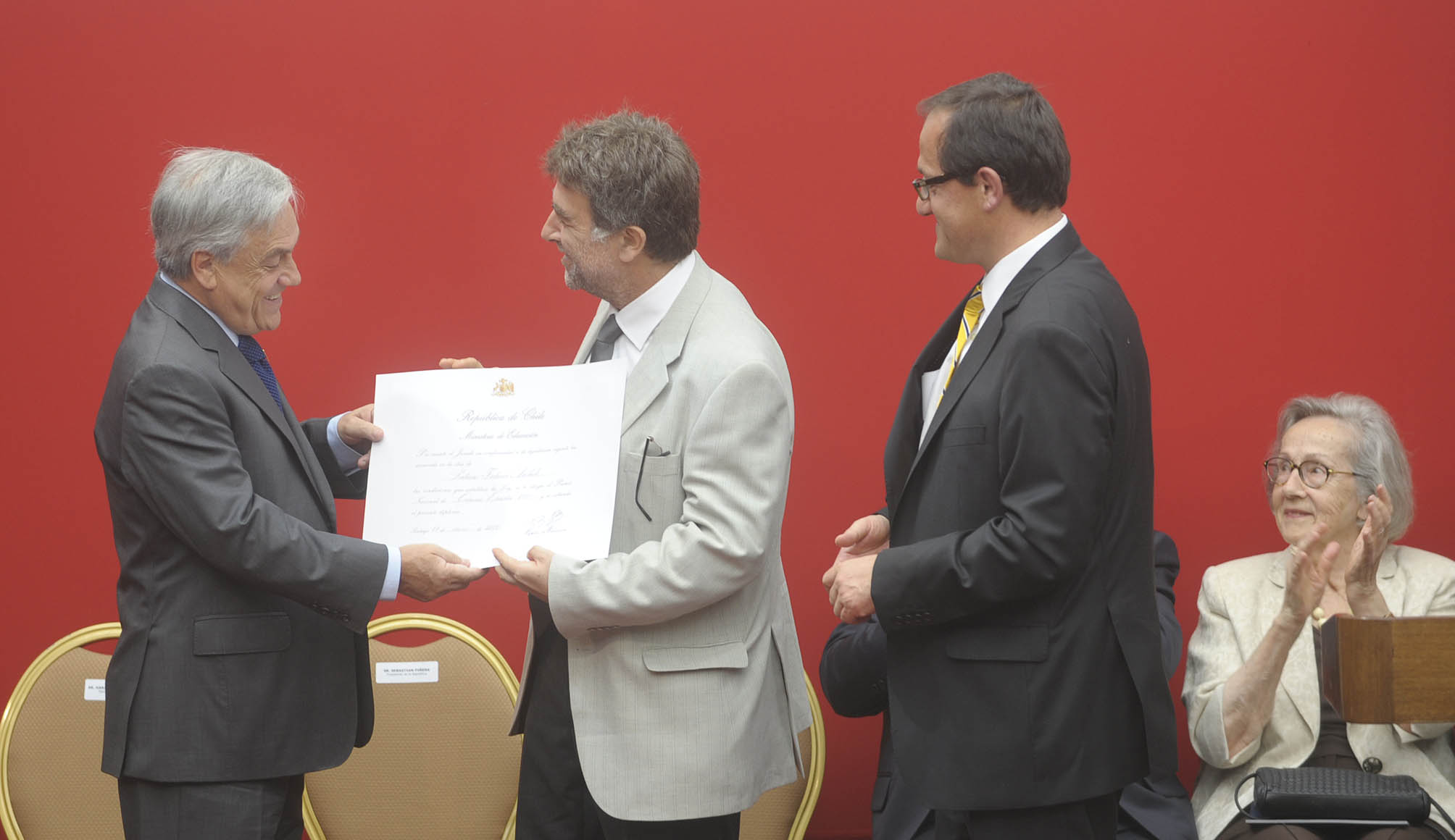 11-01-2012 Entrega premios nacionales